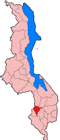 [1]を参考に、ネノ県（Neno District）の地図。